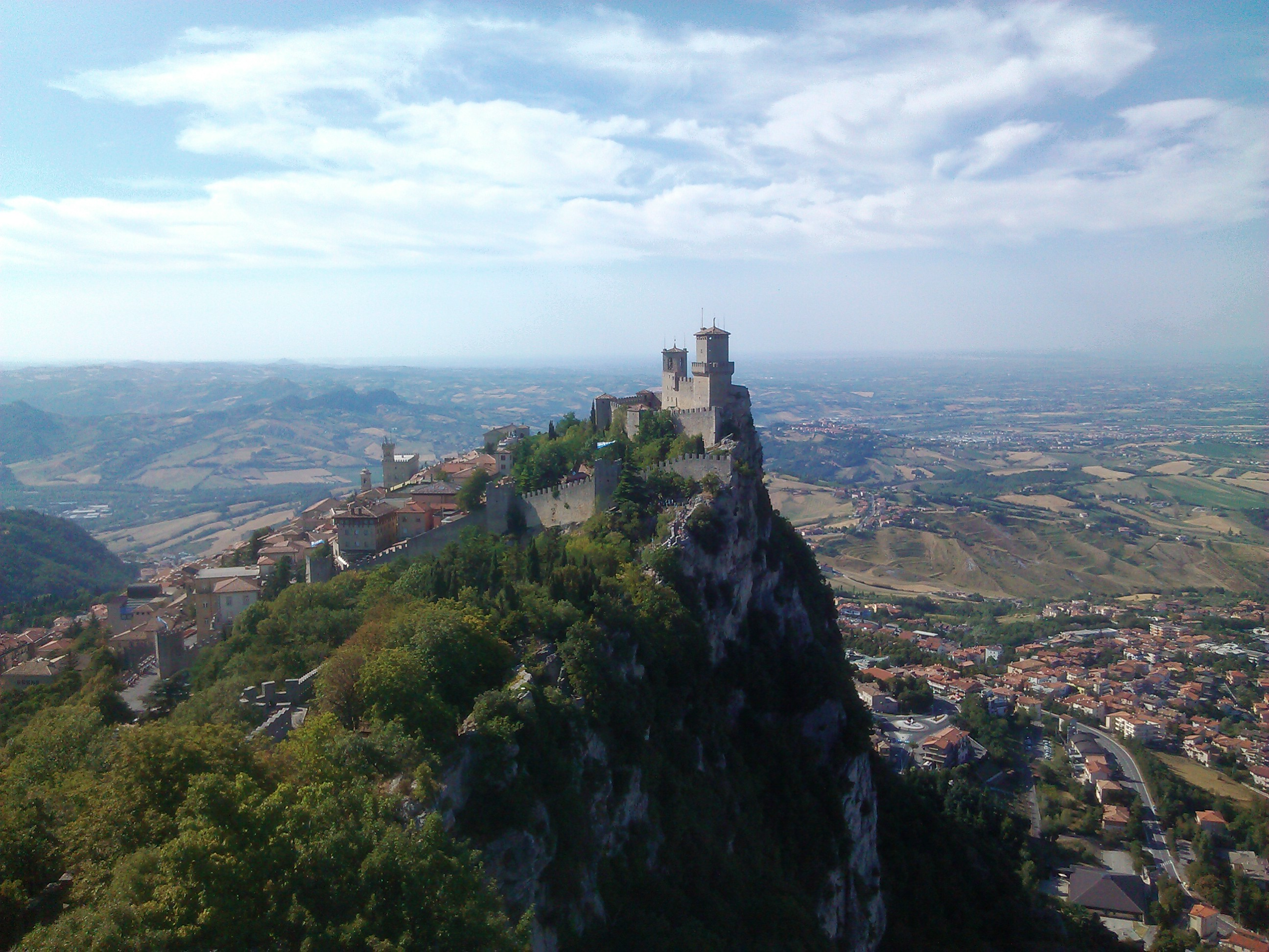 San Marino